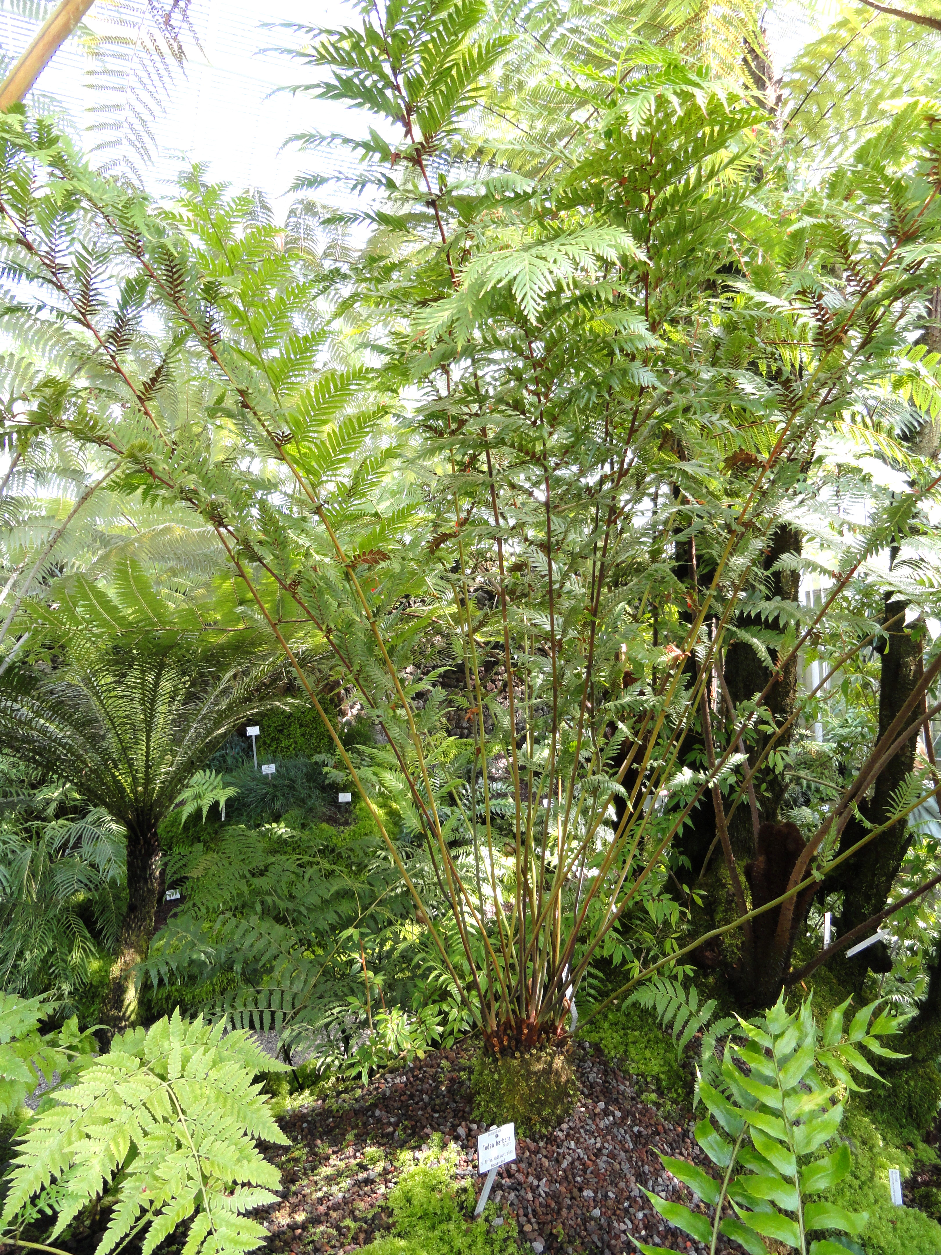 Todea barbara specimen in the Botanischer Garten München-Nymphenburg, Munich, Germany.